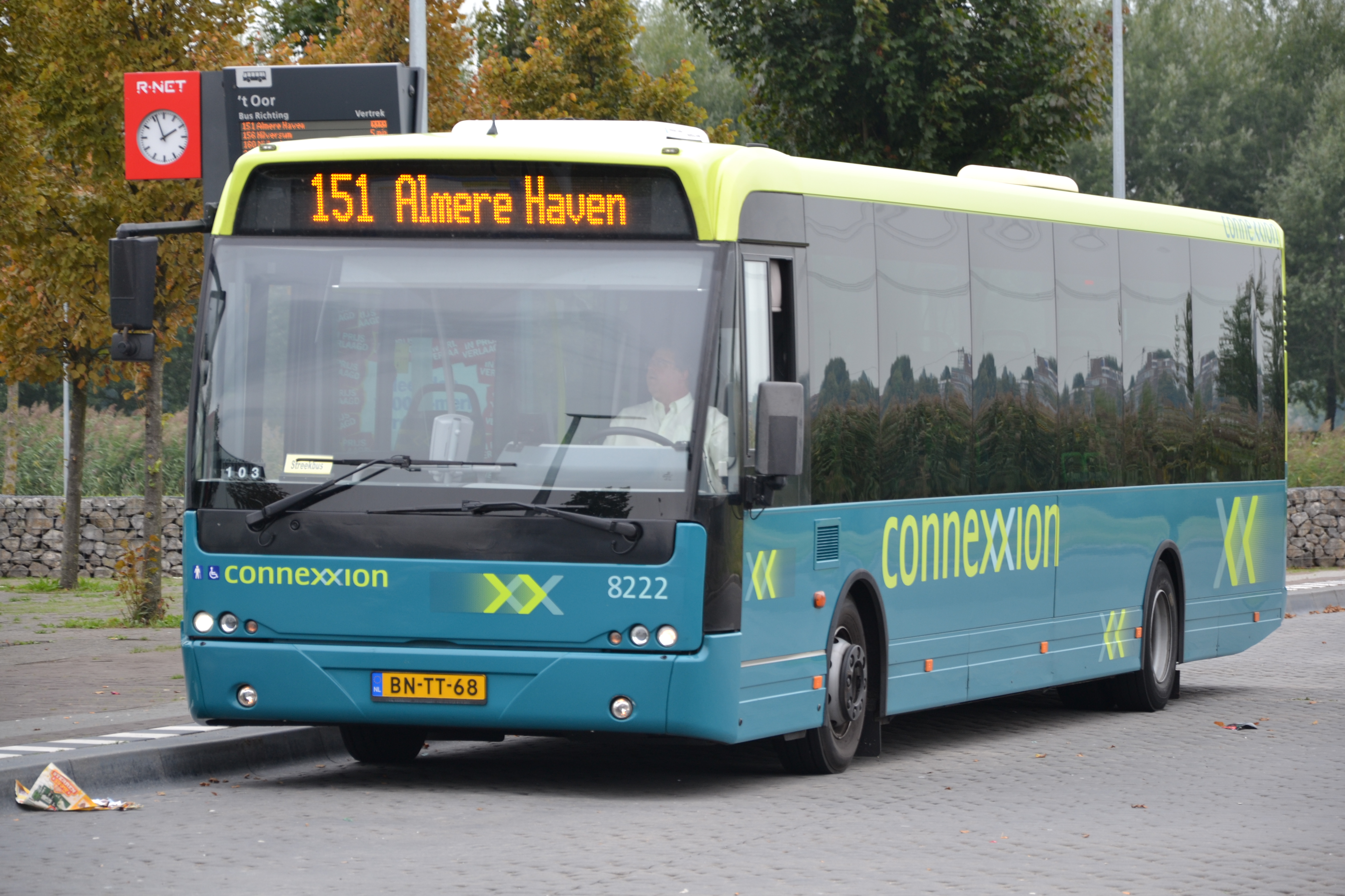 Connexxion 8222, een VDL Ambassador, als lijn 151 naar Almere-Haven op het busstation 't Oor, in Almere-Centrum.